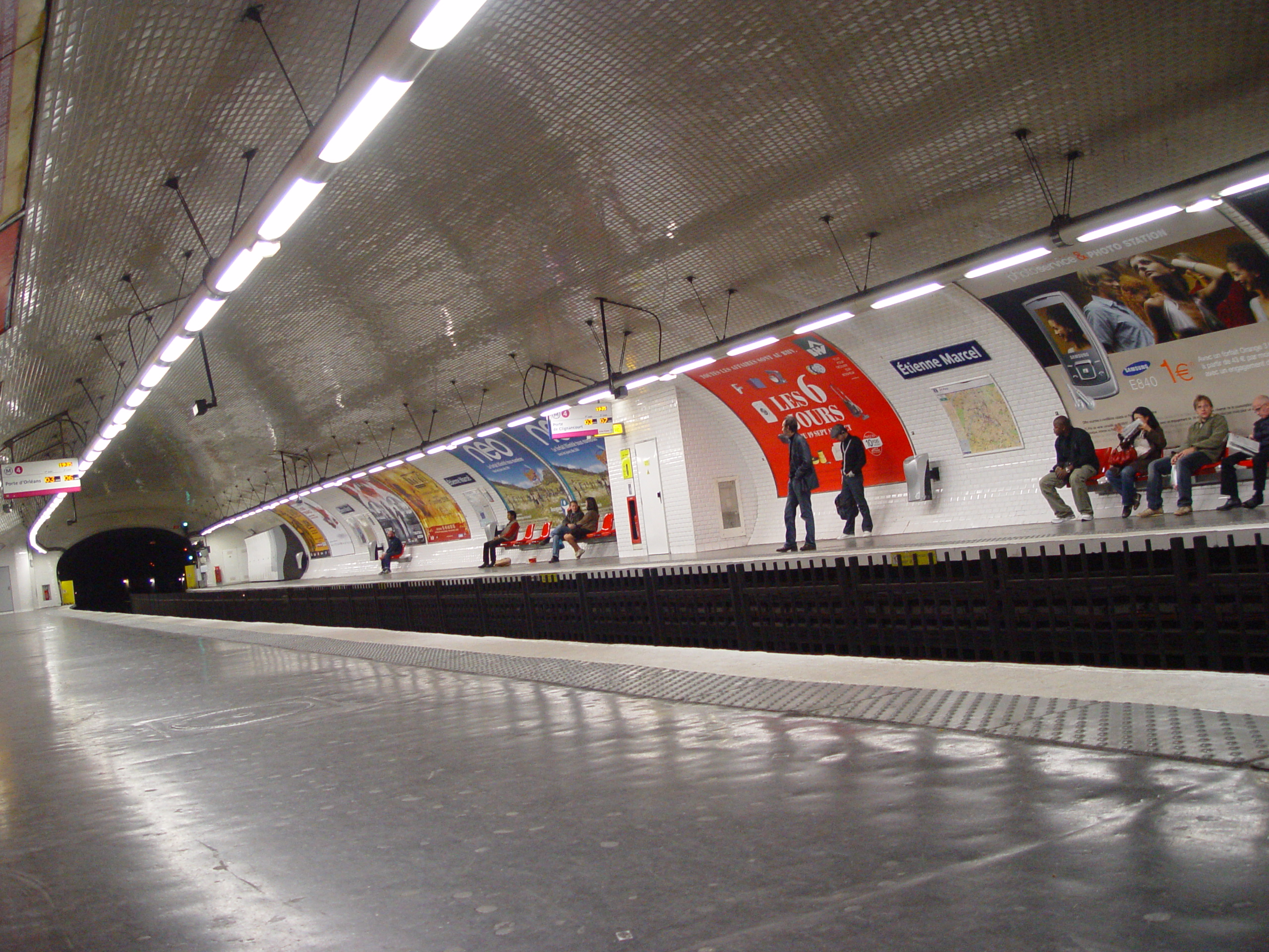 Station Étienne Marcel, ligne 4, métro de Paris.